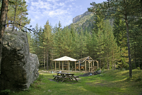 Borovetz_30.jpg